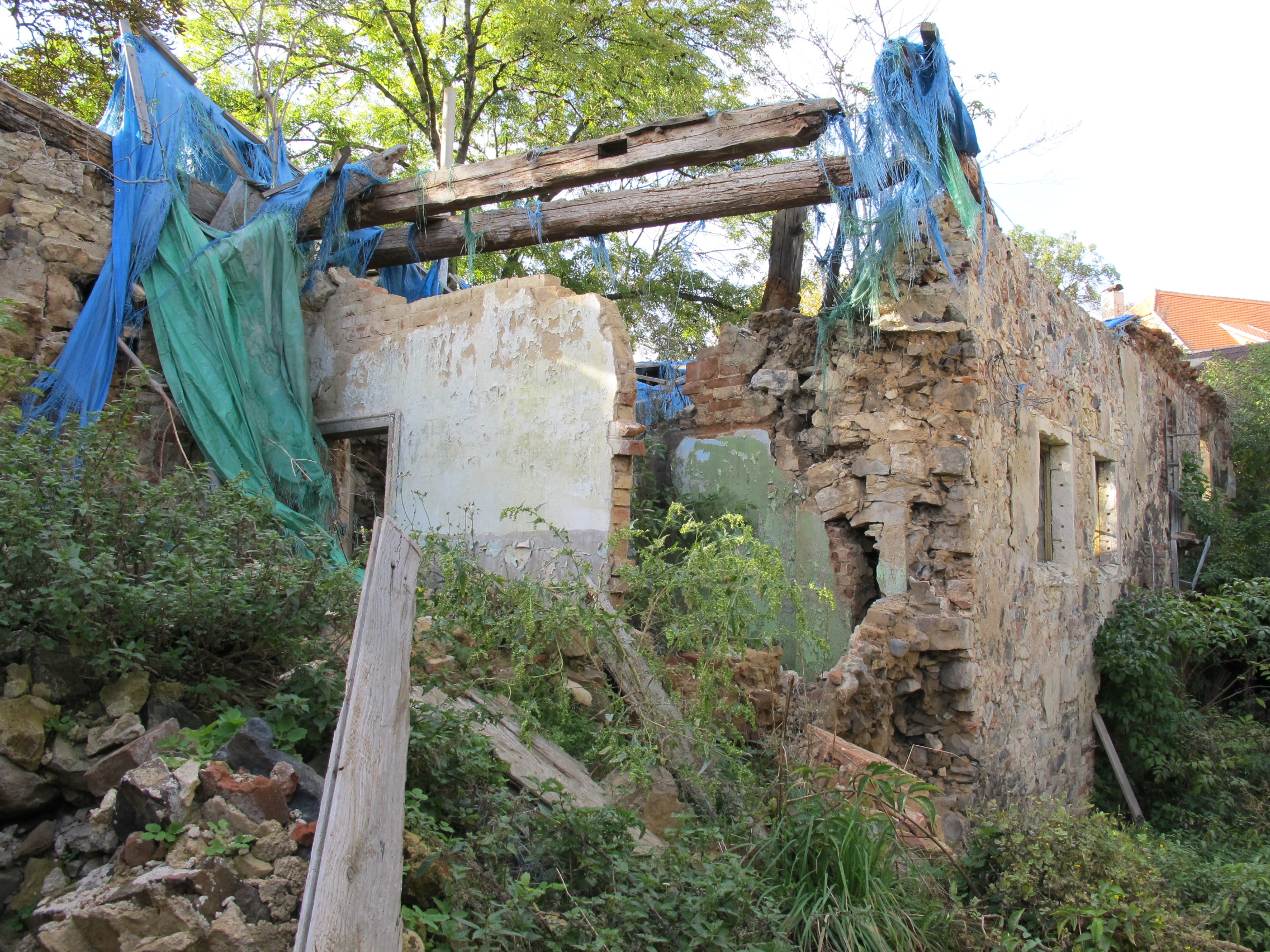 Vodní mlýn (Rudolice), Mlýnská 12, Rudolice